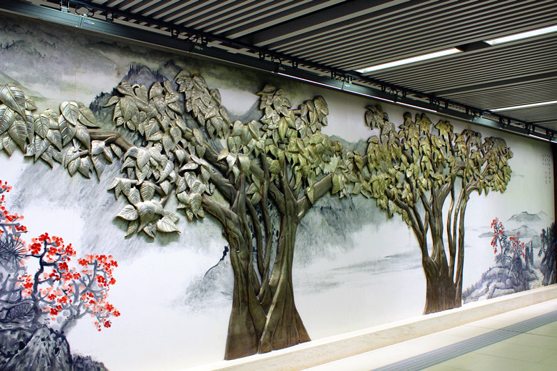 中文（中国大陆）: 武汉地铁2号线宝通寺浮雕